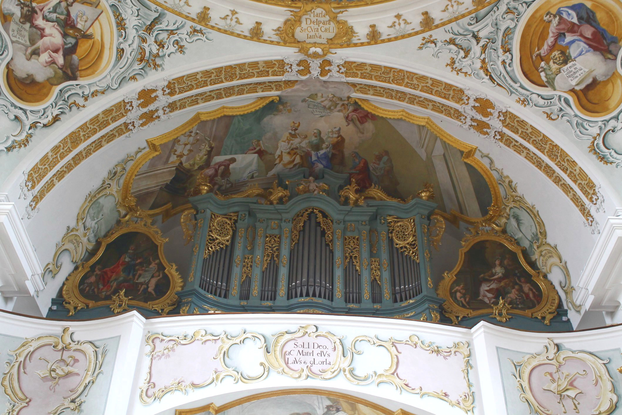 Orgel der Wallfahrtskirche Marienberg bei Burghausen (1769, Anton Bayr, I/P, 11 Register)